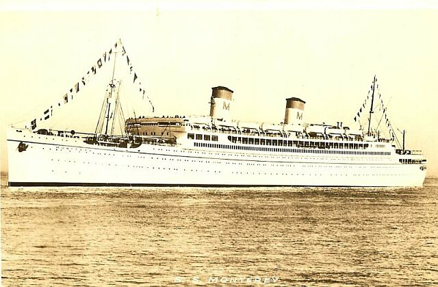 SS Monterey